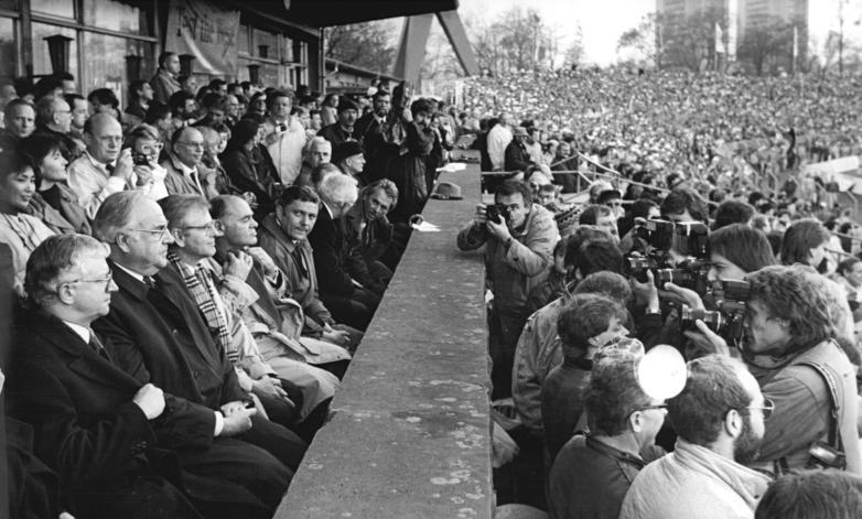 ADN-Häßler-26.3.90-Dresden. Fußball-Gala. Auf der Ehrentribüne verfolgten u. a. Bundeskanzler Dr. Helmut Kohl (2.v.l.) und Oberbürgermeister Wolfgang Berghofer (5.v.l.) das Spiel zwischen einer deutsch-deutschen Mannschaft und einer Weltauswahl links: Kanzleramtsminister Rudolf Seiters